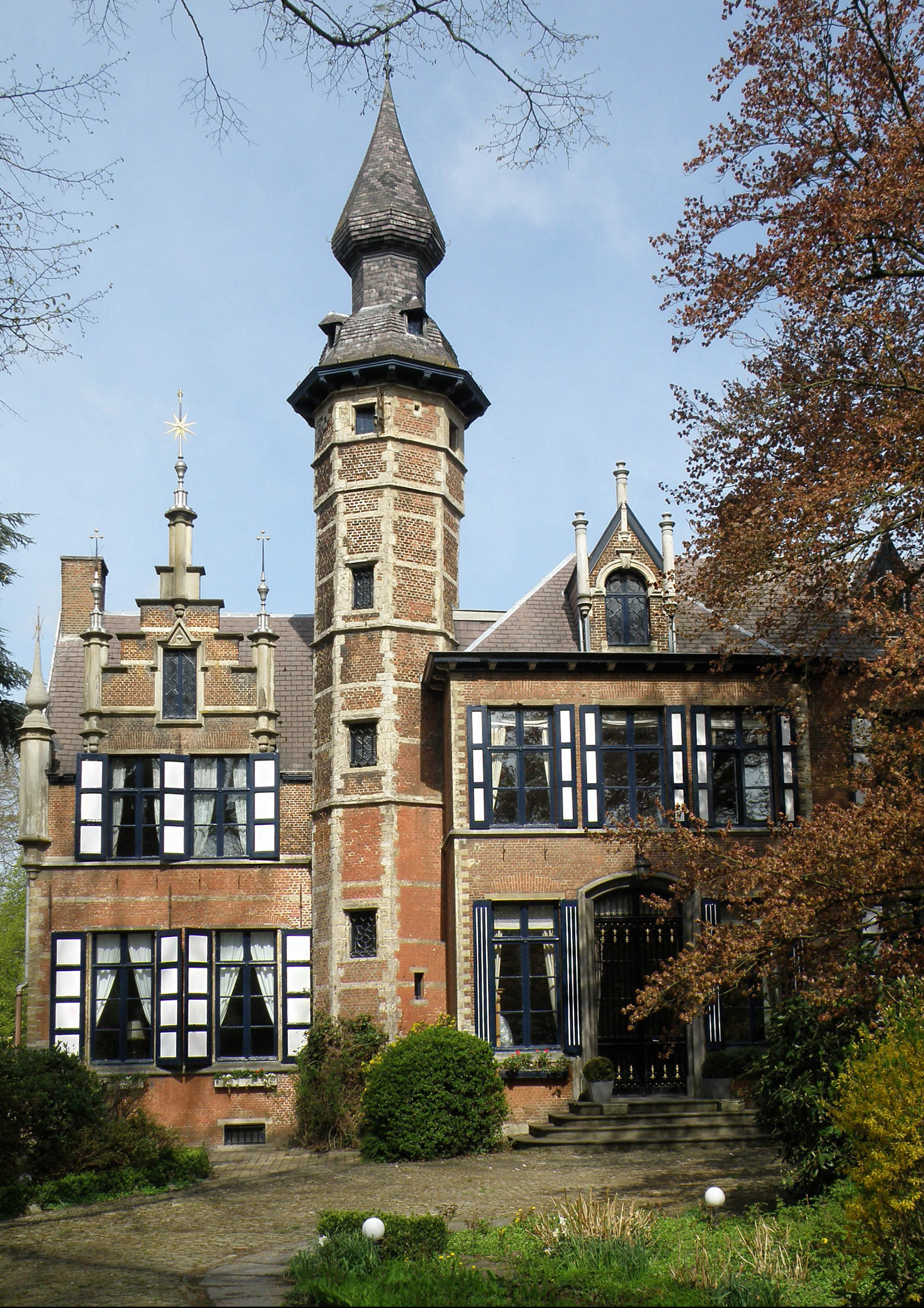 Mortsel (prov. d’Anvers, Belgique). Château Ten Dorpe, sis au n° 3 de la Theofiel Reynlaan, dans la lointaine banlieue sud-est d’Anvers. Daté du XVIIe ; importants remaniements au XIXe dans le sens néo-Renaissance flamande.